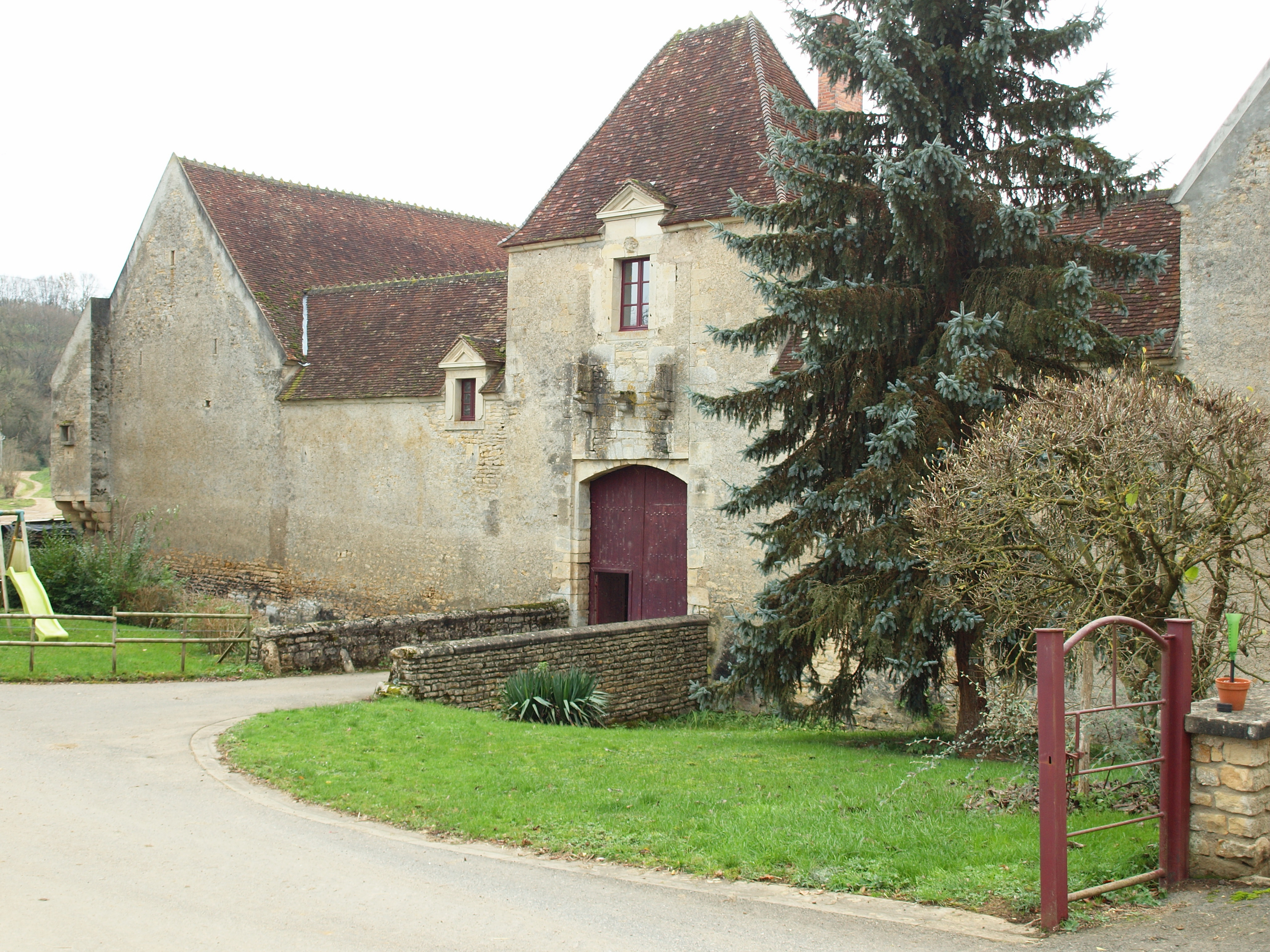 Corvol-l'Orgueilleux (Nièvre, France) ; Sauzay : ferme fortifiée